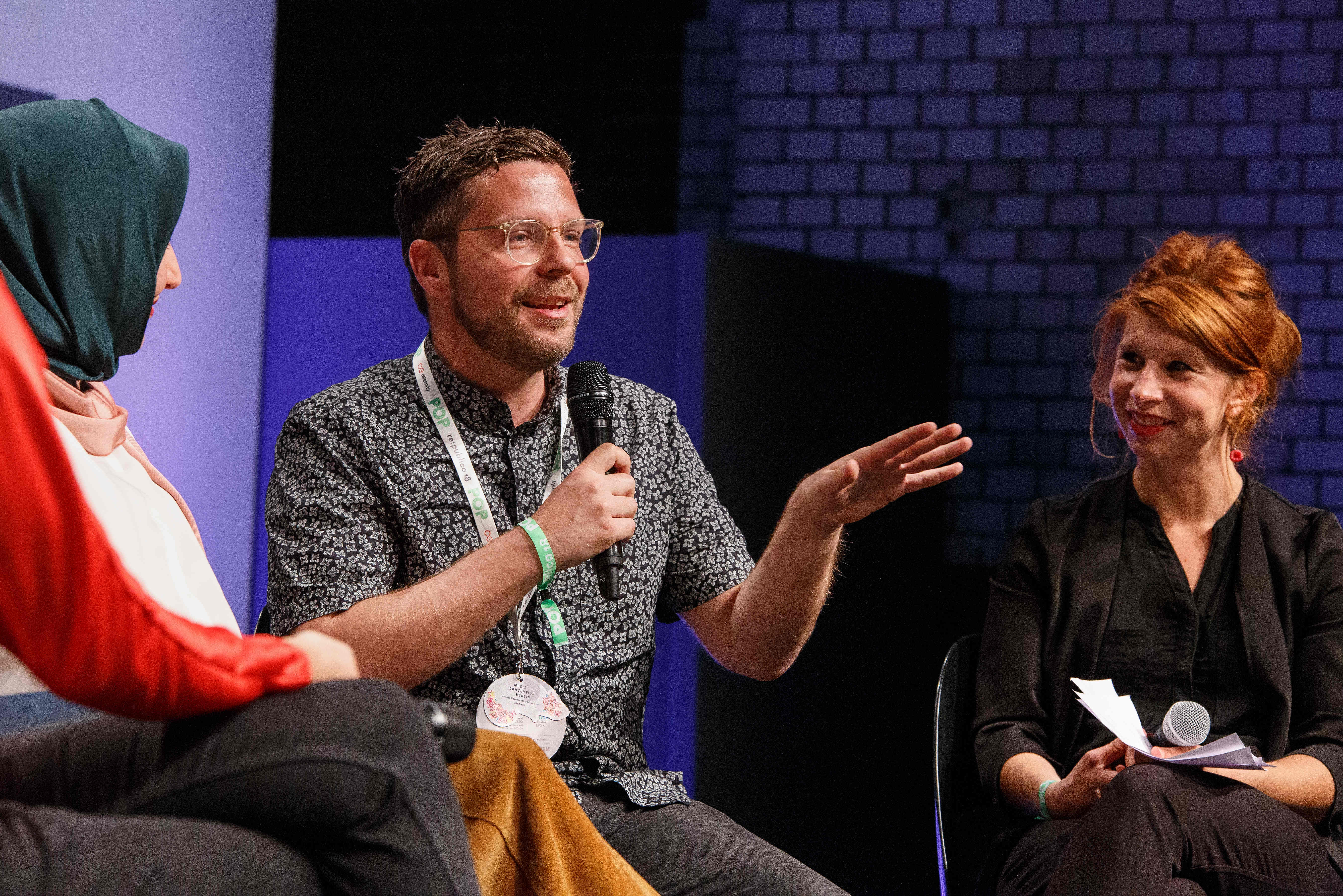 03.05.2018, Berlin: Discussion: Zivilcourage im Netz! Speaker: Hannes Ley, Gerald Hensel, Kübra Gümüsay, Franzi von Kempis, Carline Mohr Die re:publica ist eine der weltweit wichtigsten Konferenzen zu den Themen der digitalen Gesellschaft und findet in diesem Jahr vom 02. bis 04. Mai in der STATION-Berlin statt. Foto: Jan Michalko/re:publica